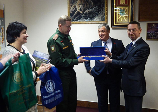 Танкисты Центрального военного округа встретились с побратимами из Севастополя